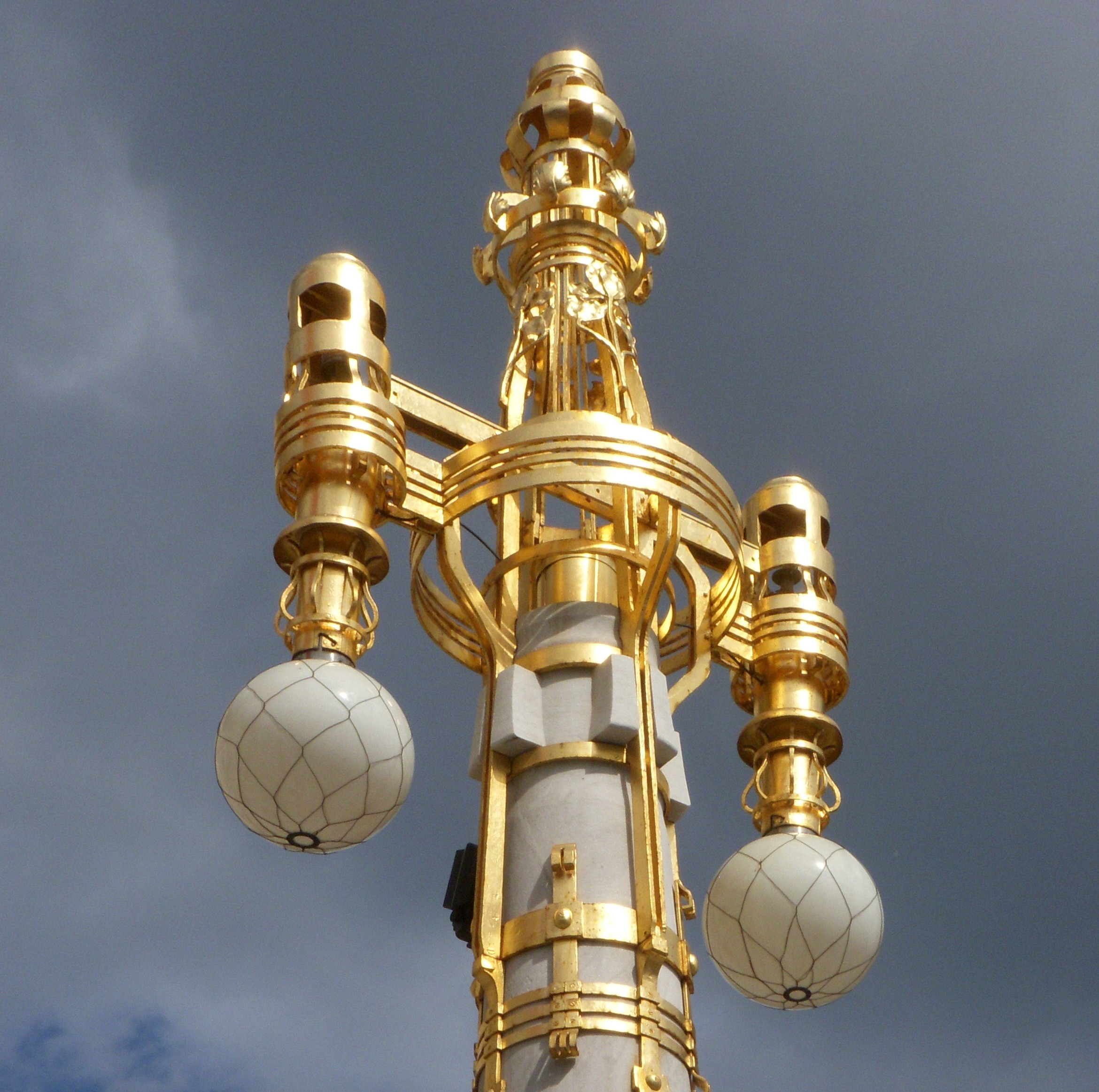 Gatubelysning i Stockholm, armatur utanför Dramatan